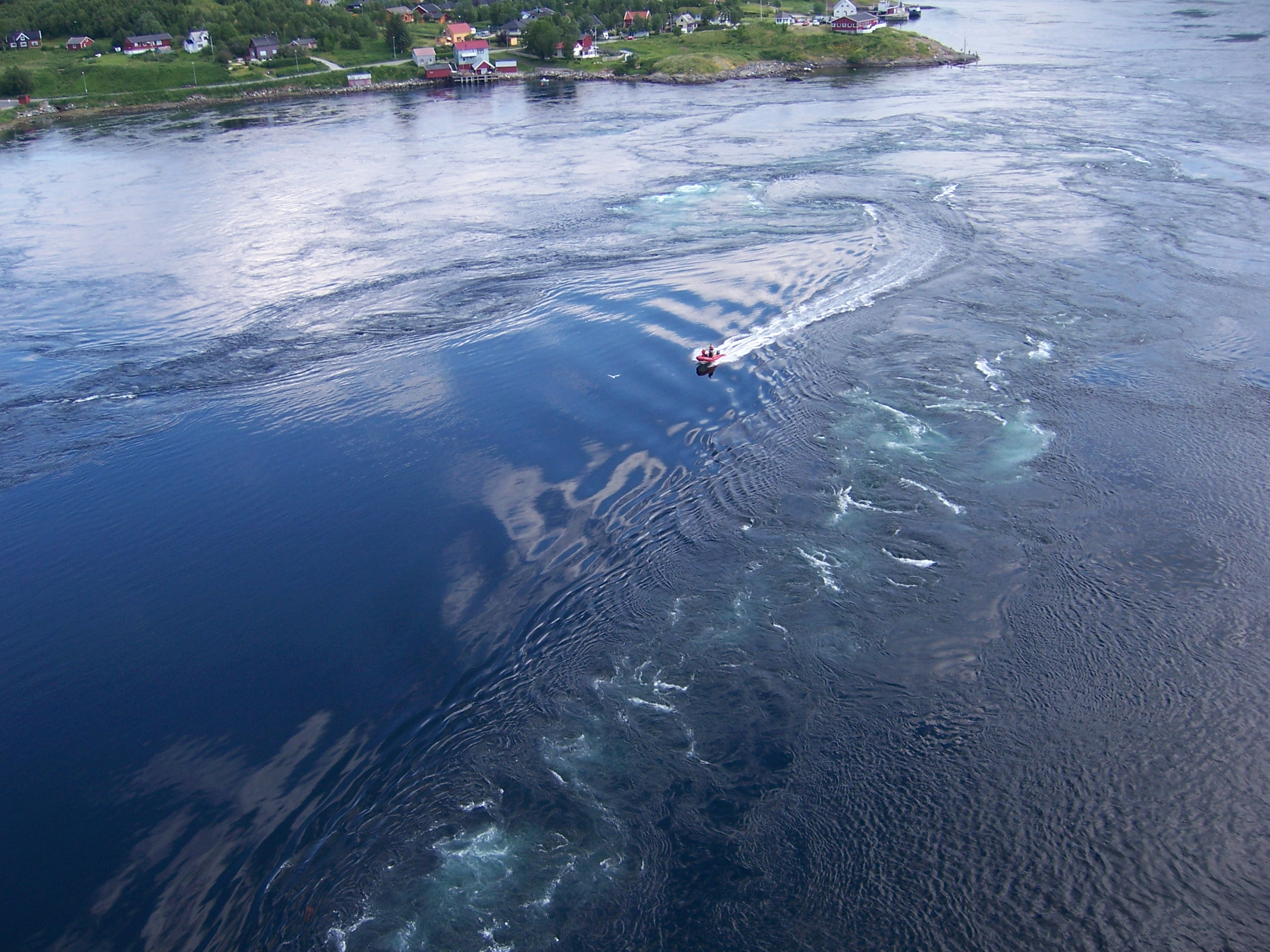 Salstraumen from Salstraumen bridge